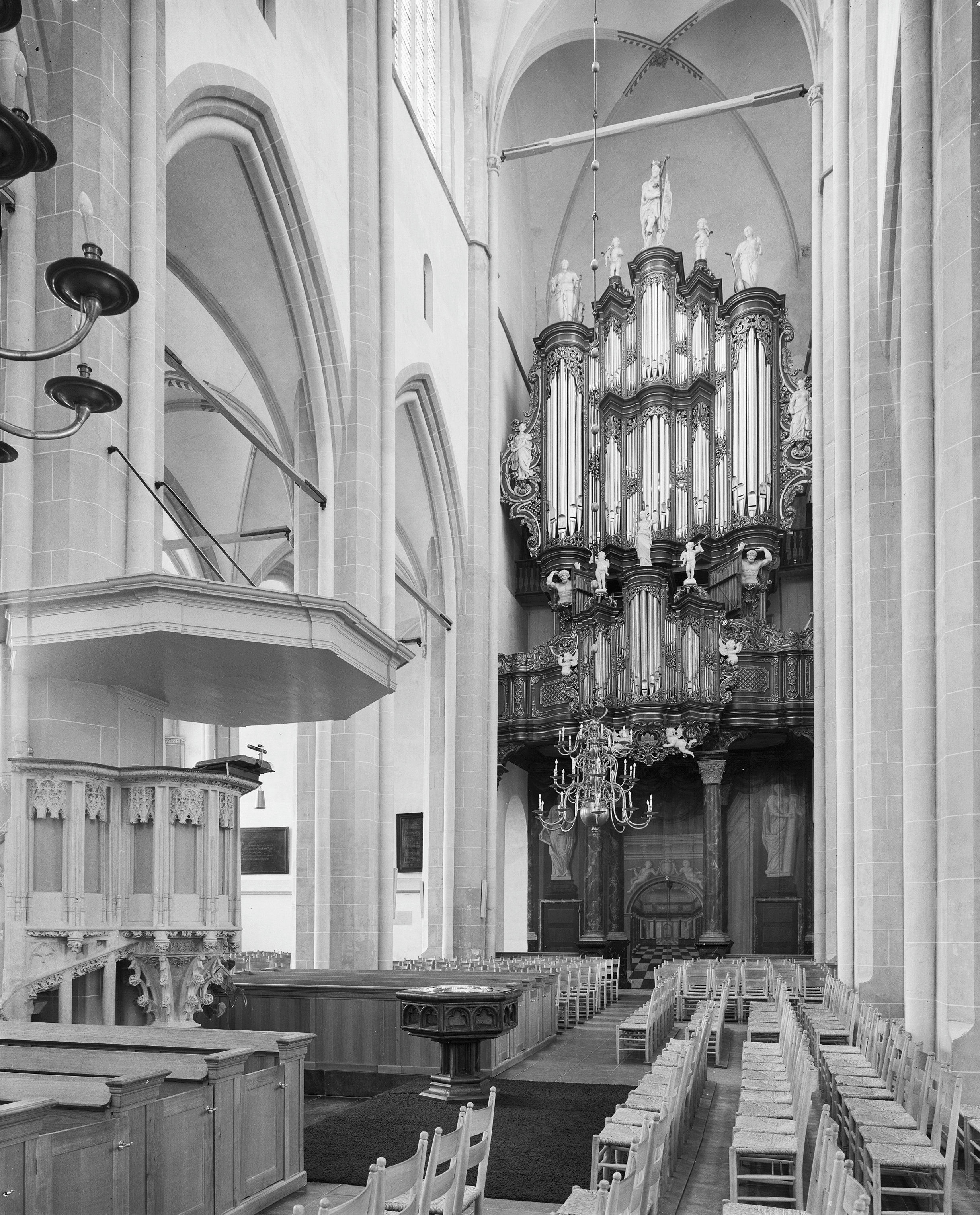 St.Nicolaas- of Bovenkerk: interieur naar het westen met orgel